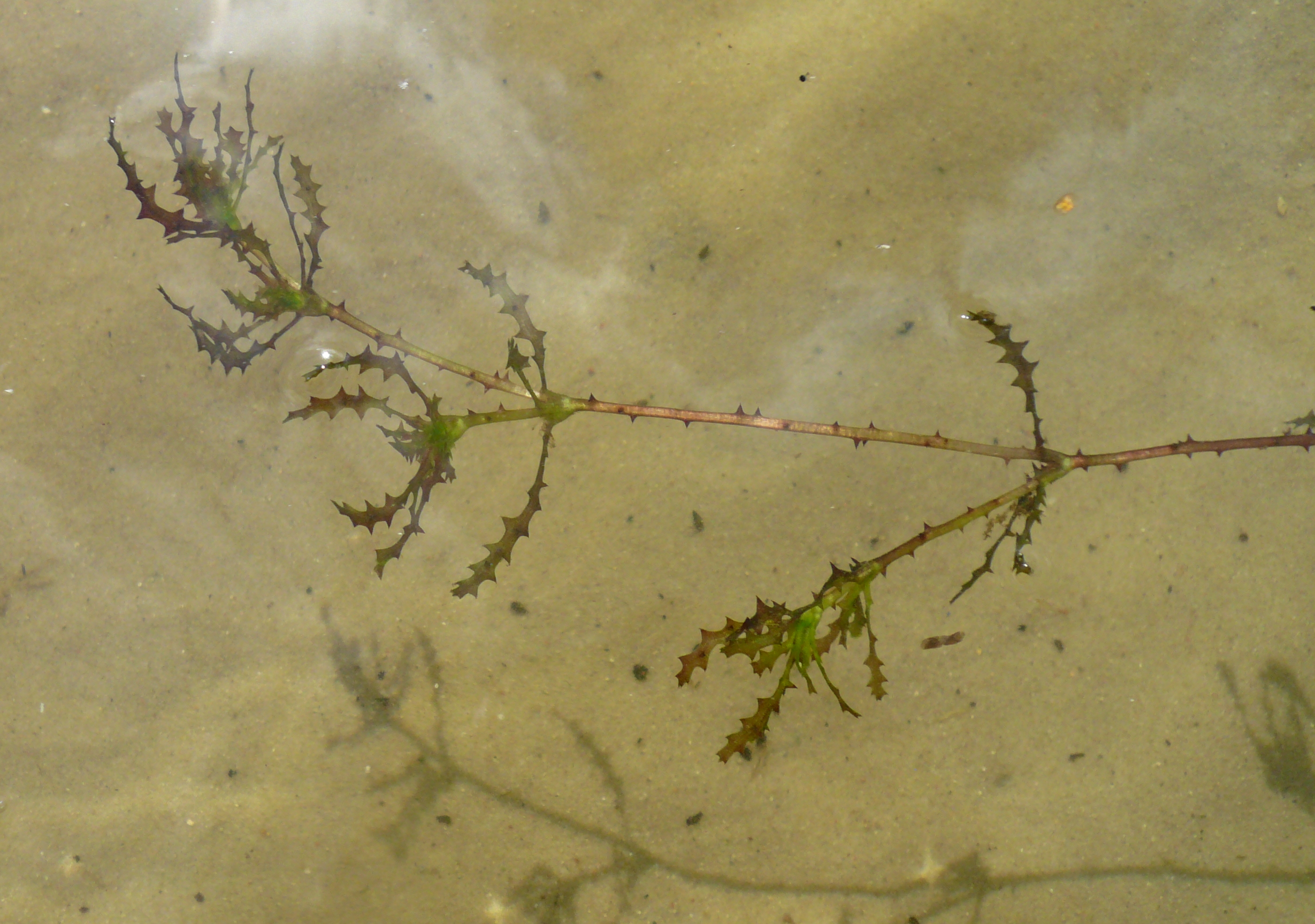 Jezierza morska w jeziorze Ostrów na Pojezierzu Myśliborskim